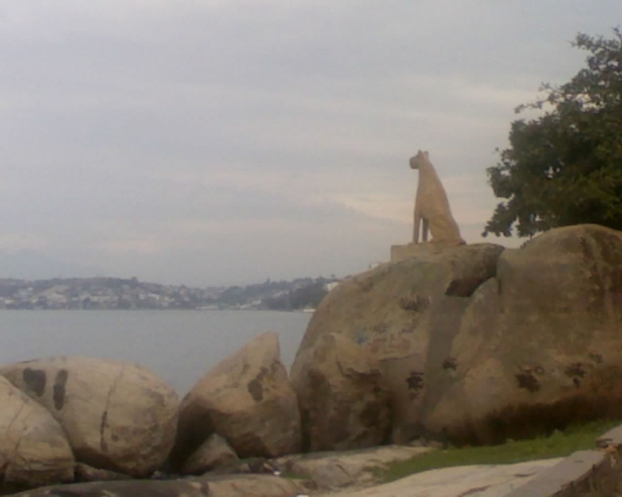 Pedra da Onça, Freguesia, Ilha do Governador, Rio de Janeiro, Brazil